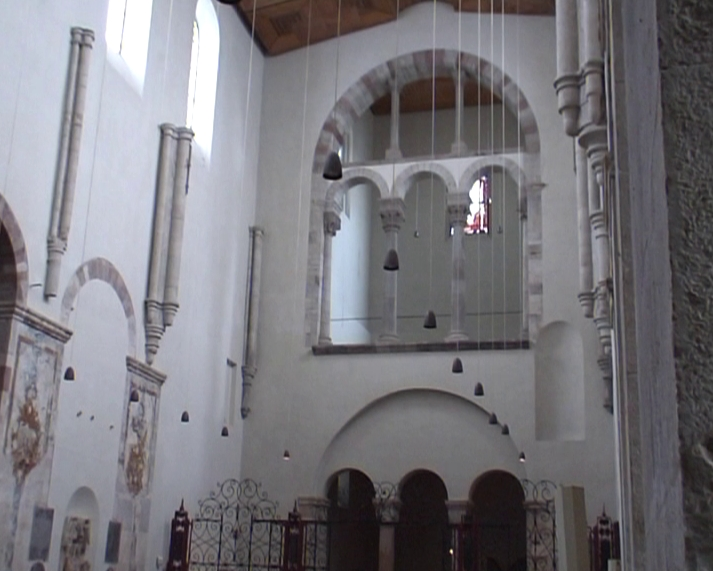 St. Maria im Kapitol, Köln, Innenwand des Westbaues